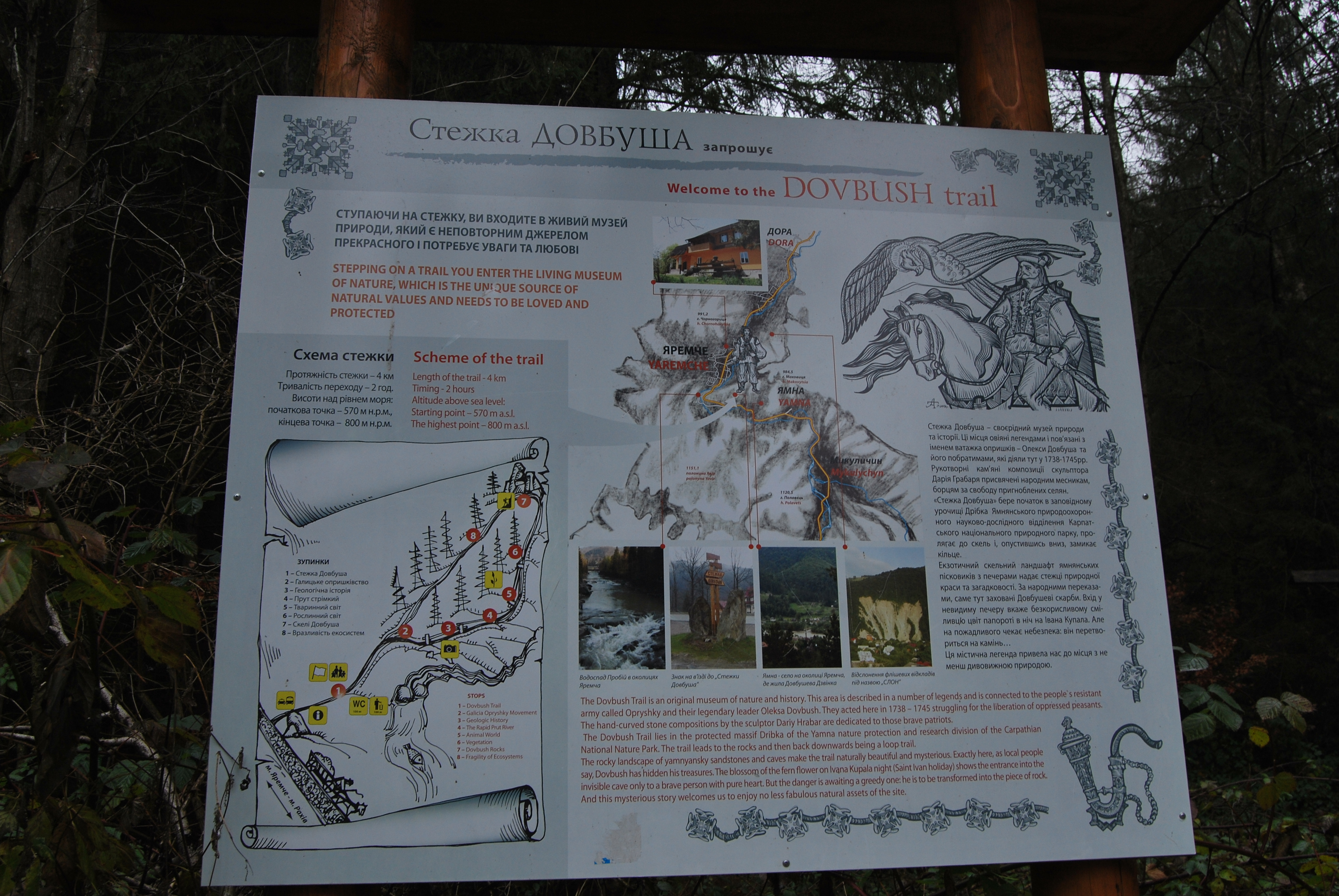 Карпатський, Яремчанська міська рада, Верховинський район, Надвірнянський район